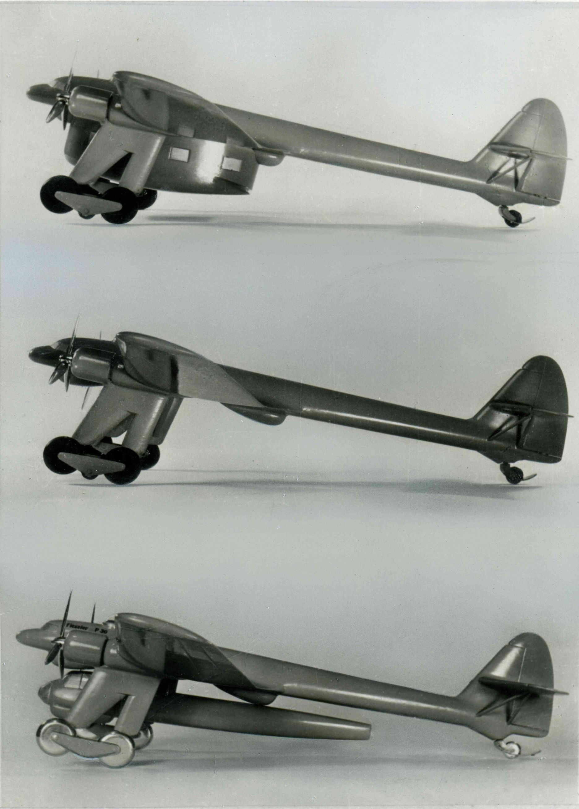 Foto der Fieseler Fi 333, als Modell eines geplanten zweimotorigen Mehrzwecke-Transportflugzeuges. Projektentwicklung bei Gerhard-Fieseler-Werke, Kassel.